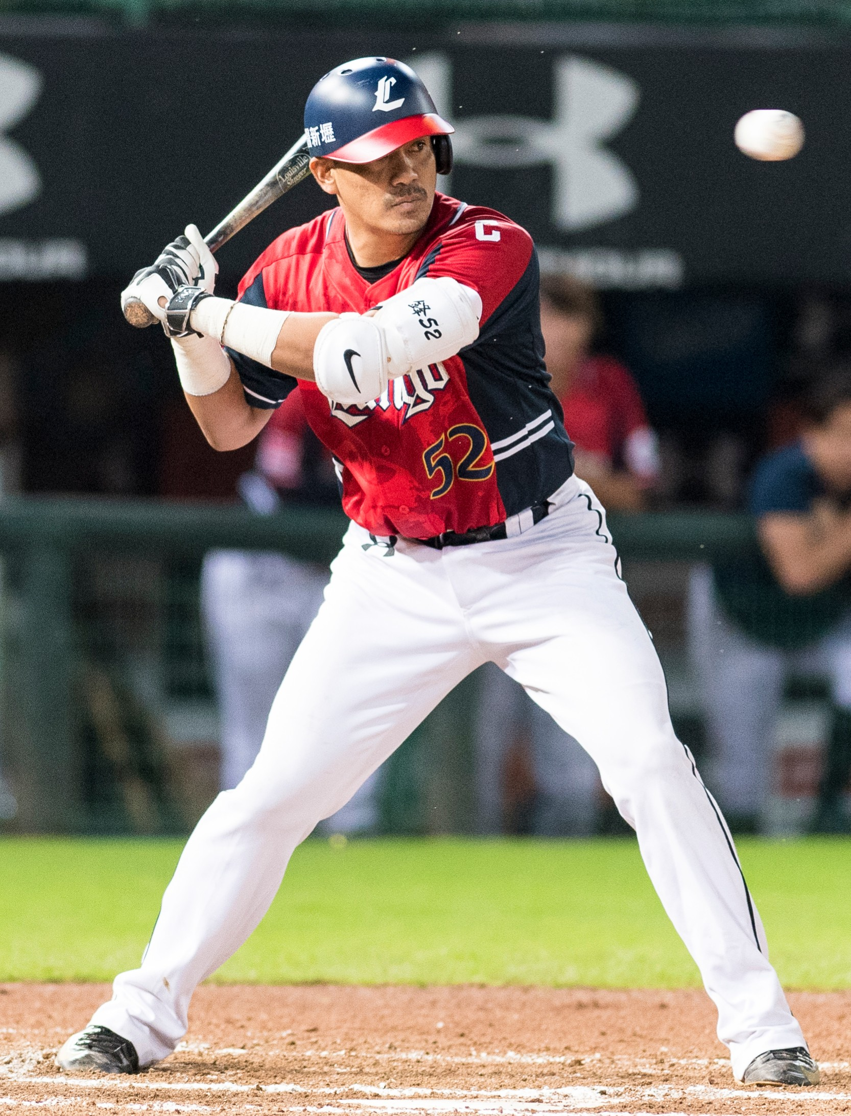 陳金鋒引退賽